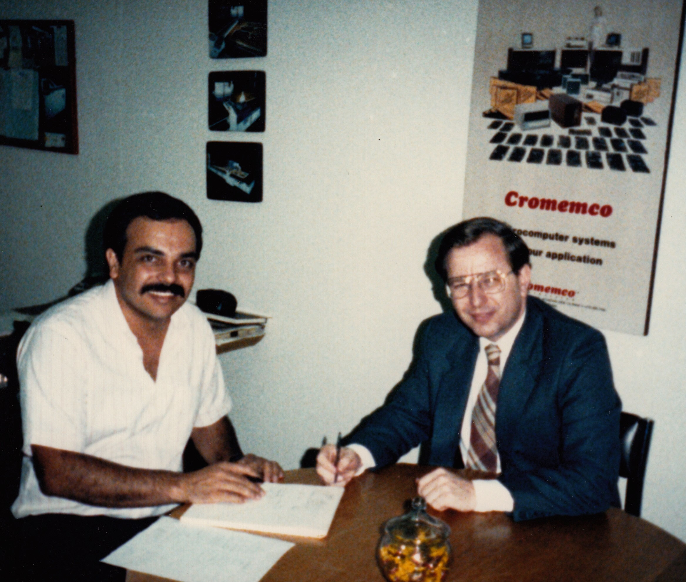 Juan Henao (Control Sistematizado) y Harry Garland (Cromemco) en Medellín, Colombia, enero de 1986. Juan Henao, Alvaro Perez y Jaime Blandon de Control Sistematizado desarrollaron los primeros sistemas de control industrial en Colombia basados en microcomputadoras Cromemco.